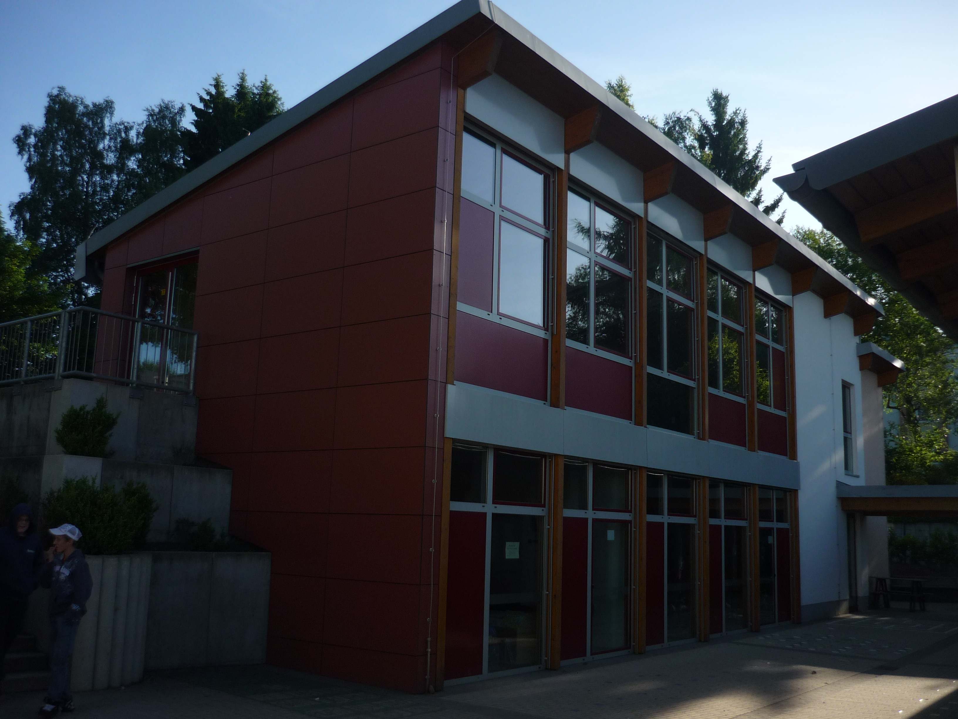 Michael-Ende-Schule in Bad Marienberg